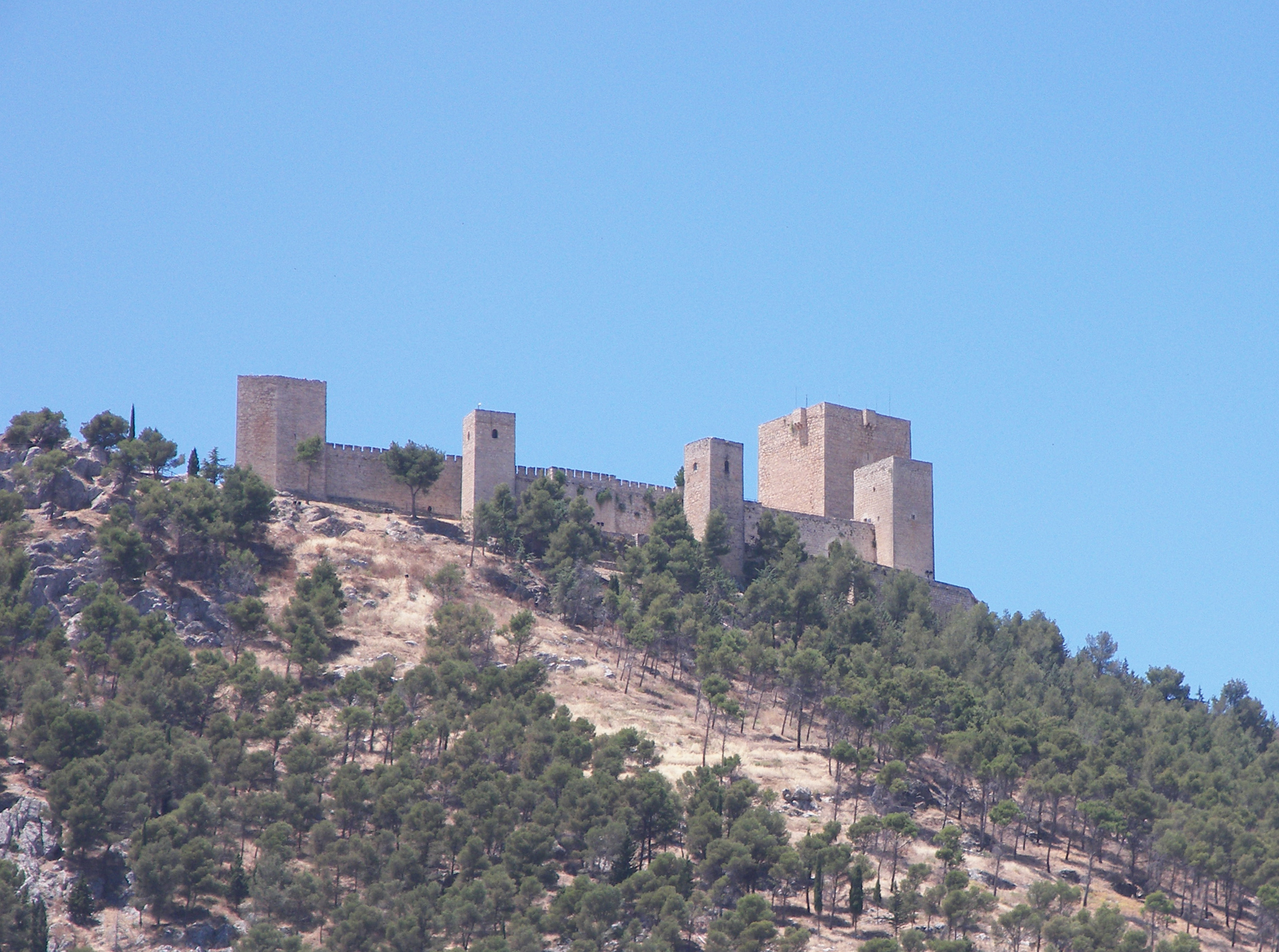 Castillo de Jaén.